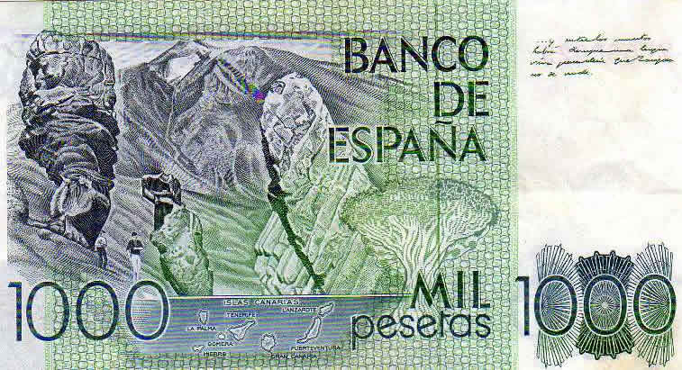 Billet de 1 000 Pesetas (1979) Dimensions 138 x 75 mm. (Espagne). Verso: Pic du Teide (Canaries).